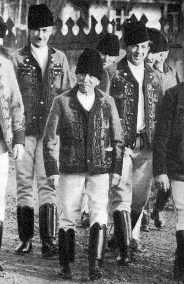 Szekler people. 1970's